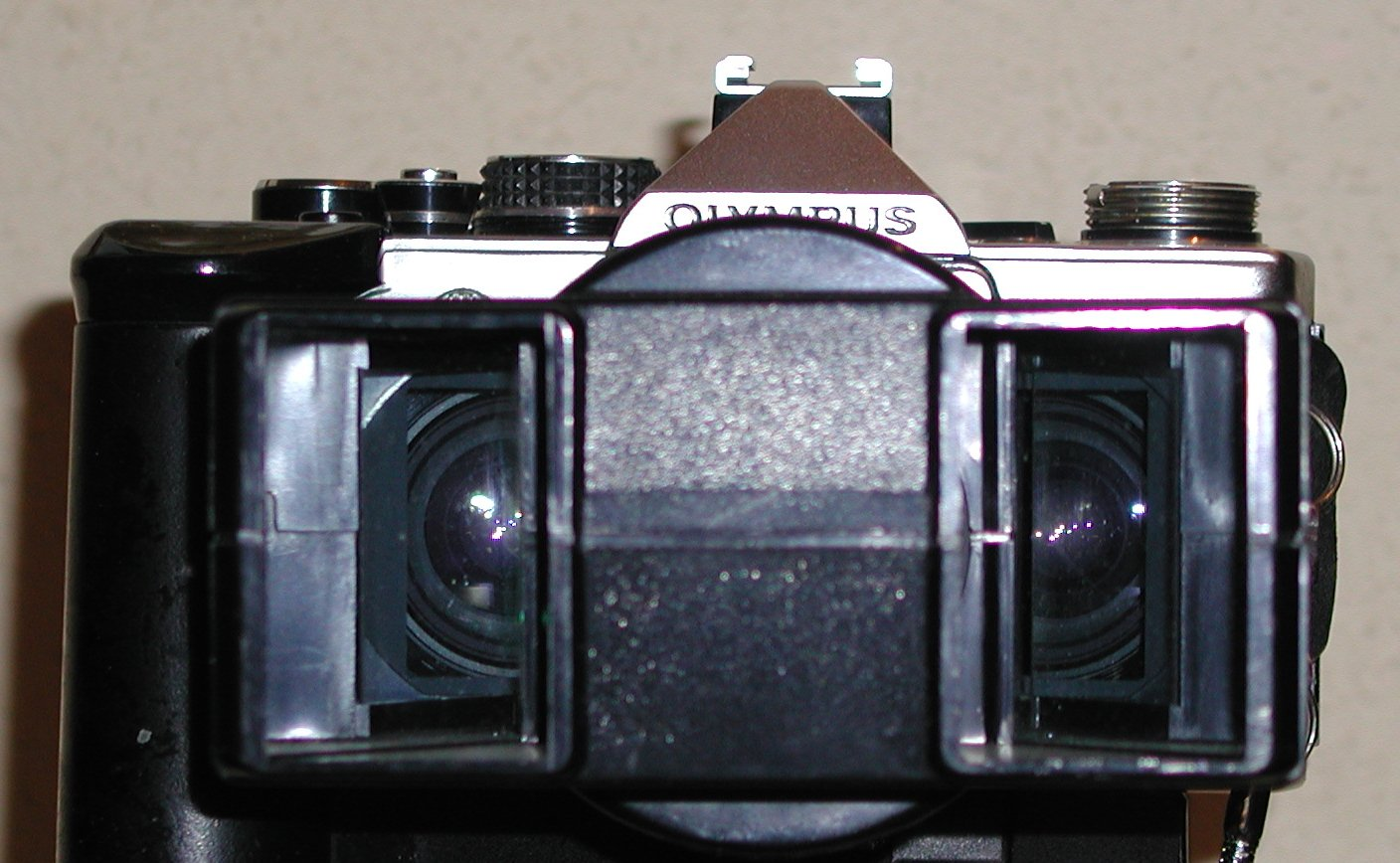 Vorsatzgerät zum Aufnehmen von 3D-Hochformatfotos Bild: Wilfried Wittkowsky, 2005 Motiv: Vorsatzgerät zum Aufnehmen von 3D-Hochformatfotos, Modell Pentax auf Olympus OM2